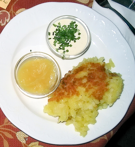 Kartoffelschmarrn, hier mit Apfelkren und Schnittlauchsauce (als Beilage zu gesondert serviertem Tafelspitz).